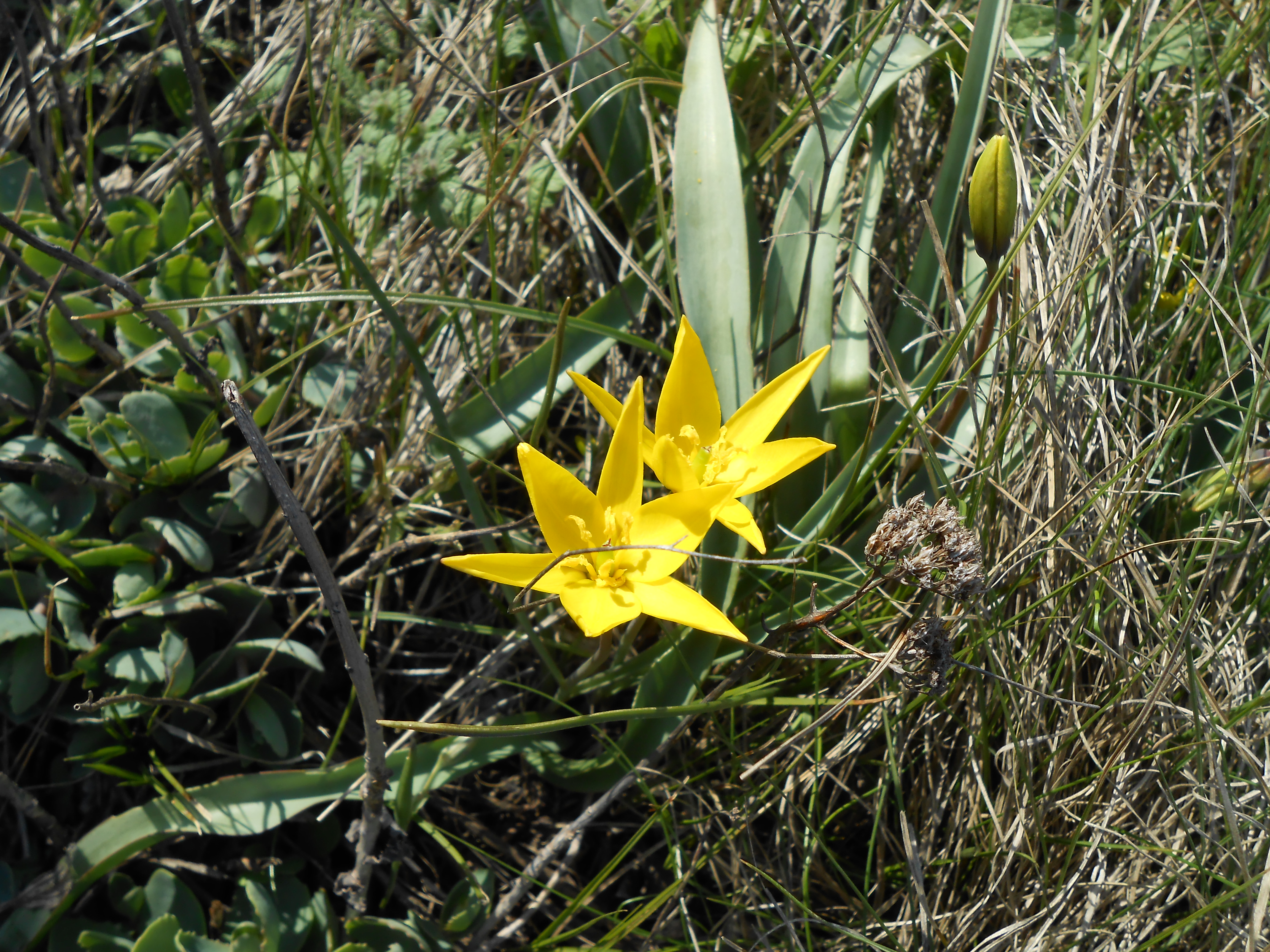 «Корсак-могила», Приморський р-н, с.Мануйлівка